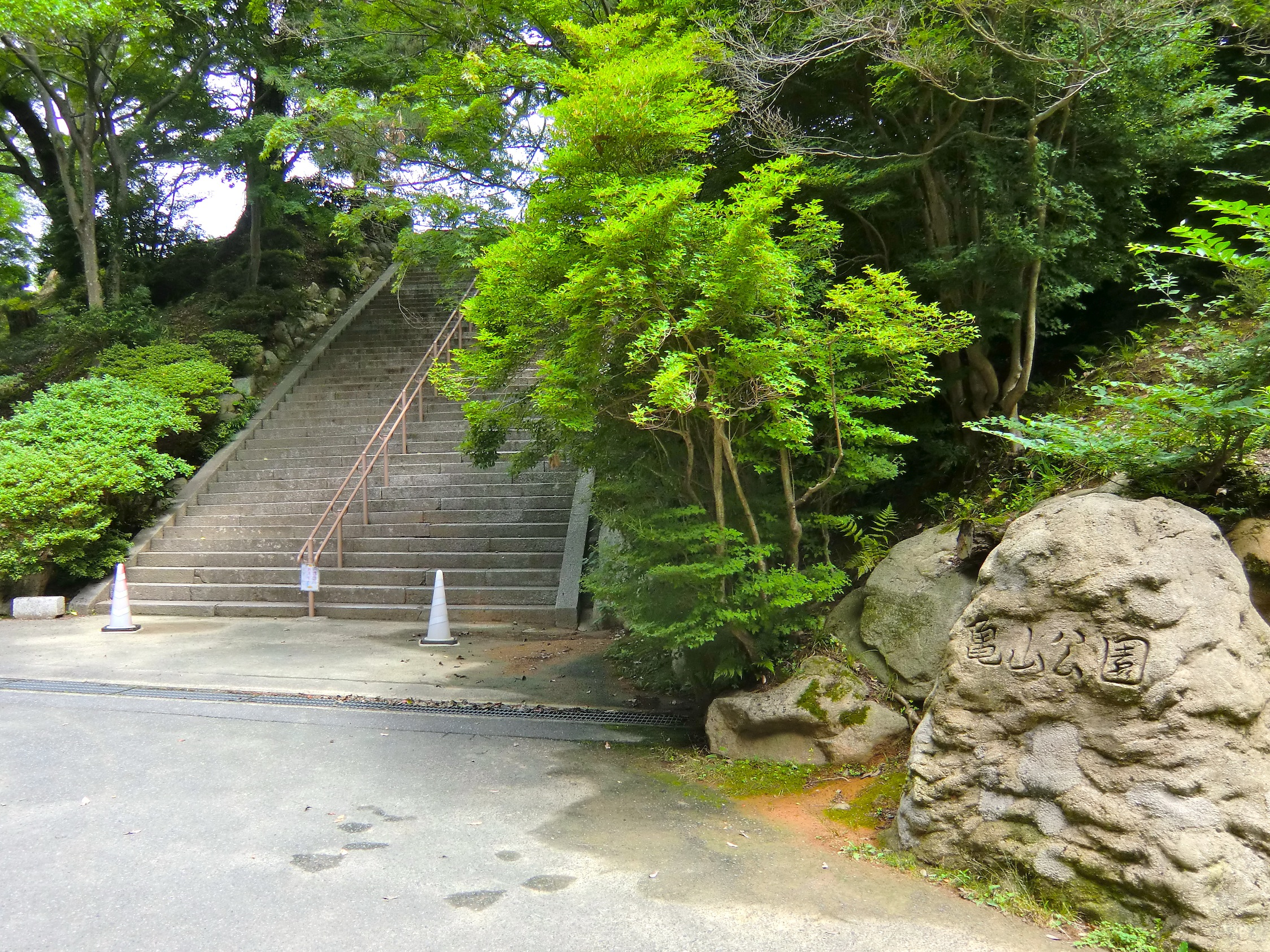 山口市亀山公園の入口